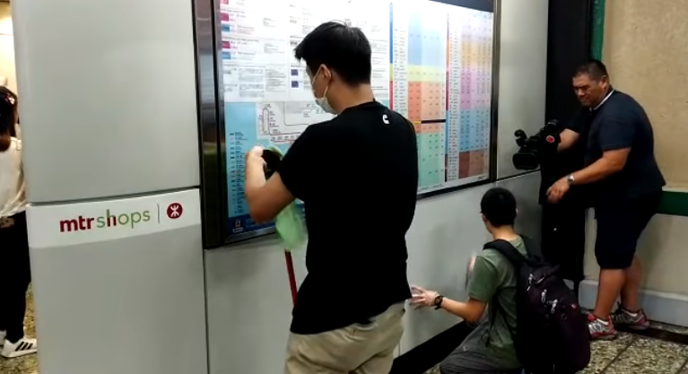 警方 8.11 當晚在港鐵葵芳站內施放一枚催淚彈後，有網民發起早上到葵芳站清潔